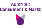 Autoriteit Consument & Markt